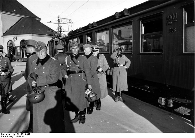 Ankunft d. 9. Pol. Bat. auf dem Osloer Westbahnhof, der Hornist blässt das Signal zum Aussteigen